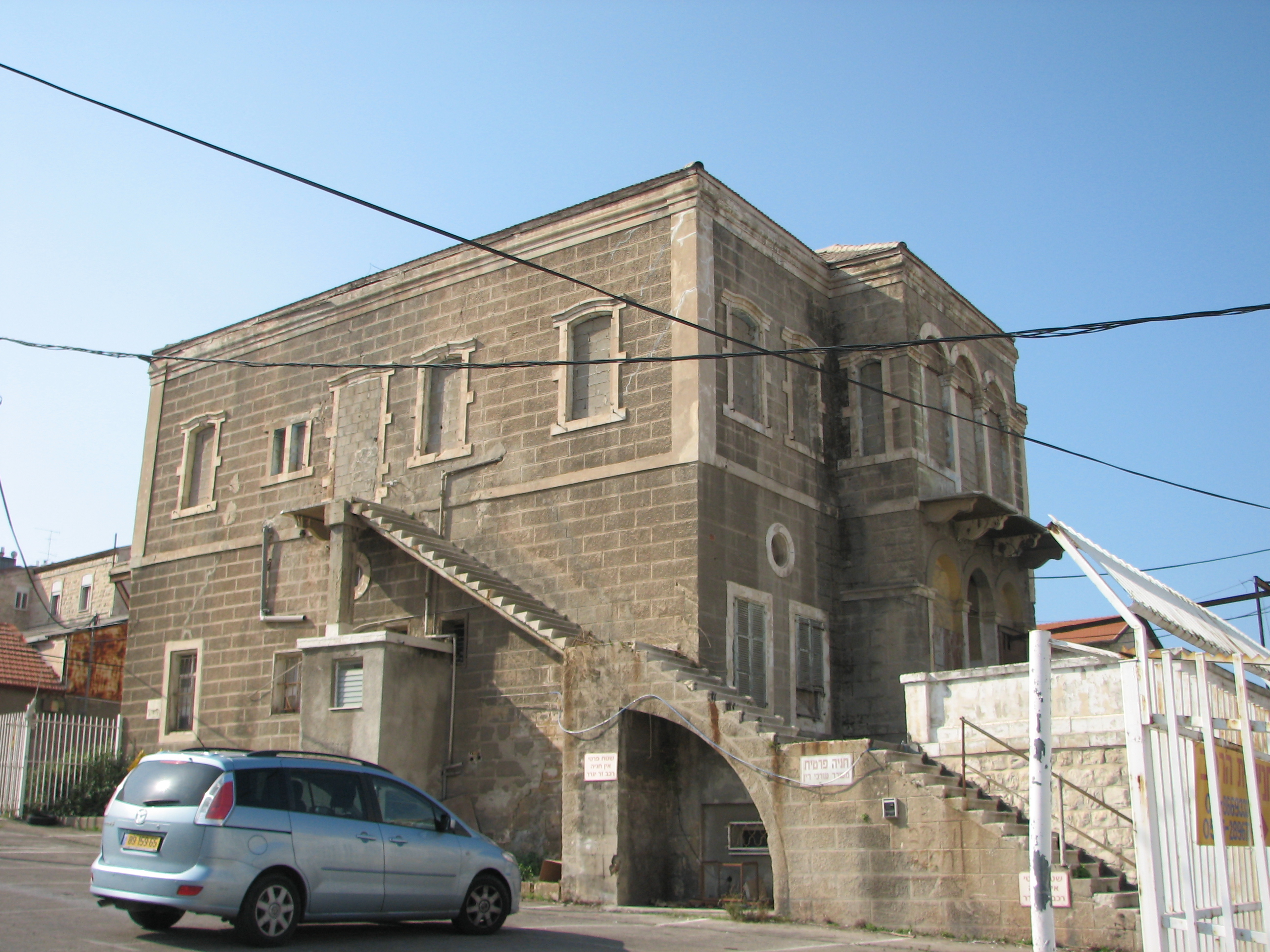 Herzliya Hotels in Haifa, there were three hotels was named "Hotel Herzliya" established in the first half of the 20th century city of Haifa by David Moshe Halevi - Epstein מלונות הרצליה בחיפה היו שלושה מלונות ששמם היה "מלון הרצליה" שהוקמו במחצית הראשונה של המאה ה-20 בעיר חיפה על ידי דוד משה הלוי-אפשטיין שרידי מבנה המלון שנפתח בשנת 1917 ברחוב אלנבי 7 בעיר התחתית בחיפה